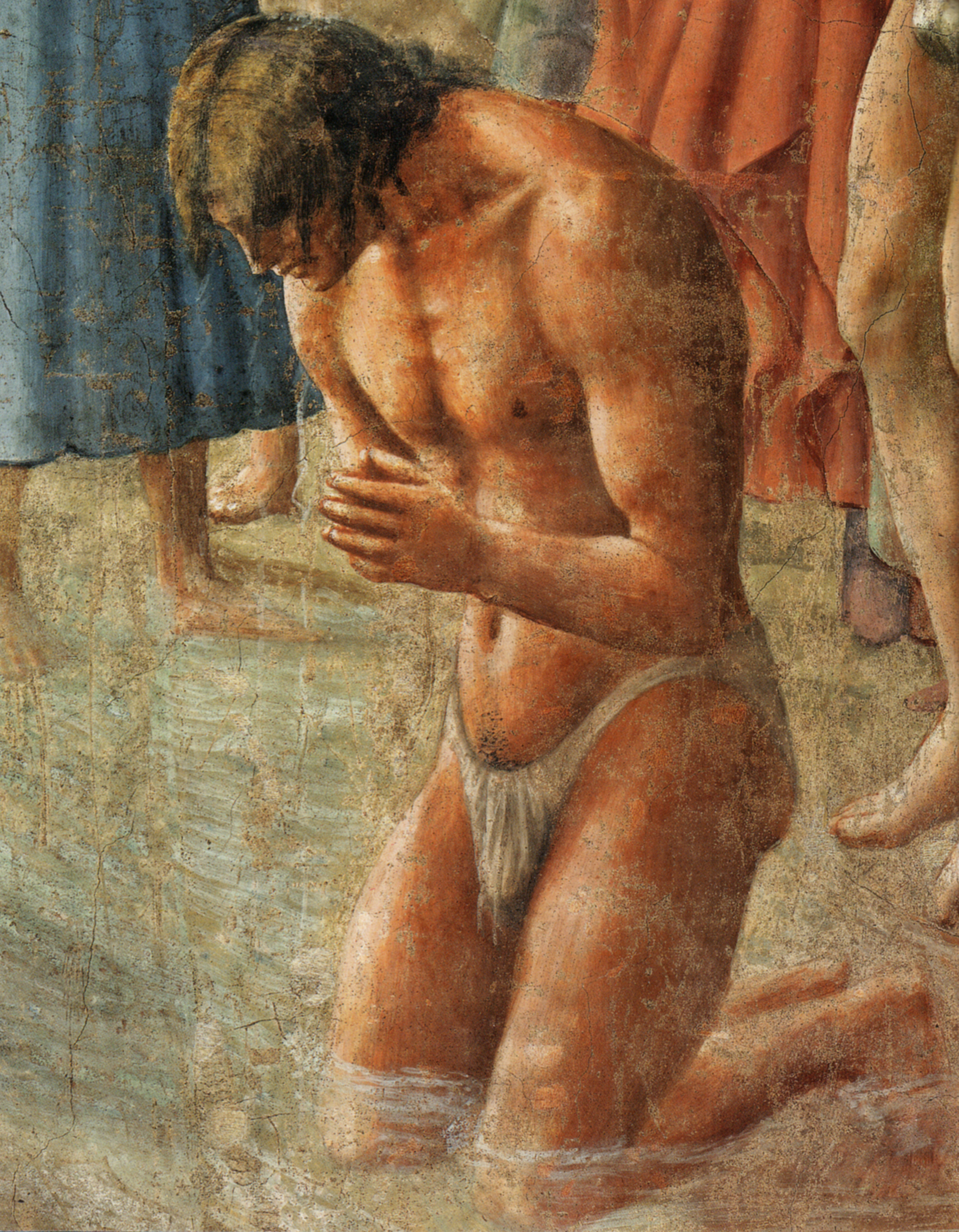 detail